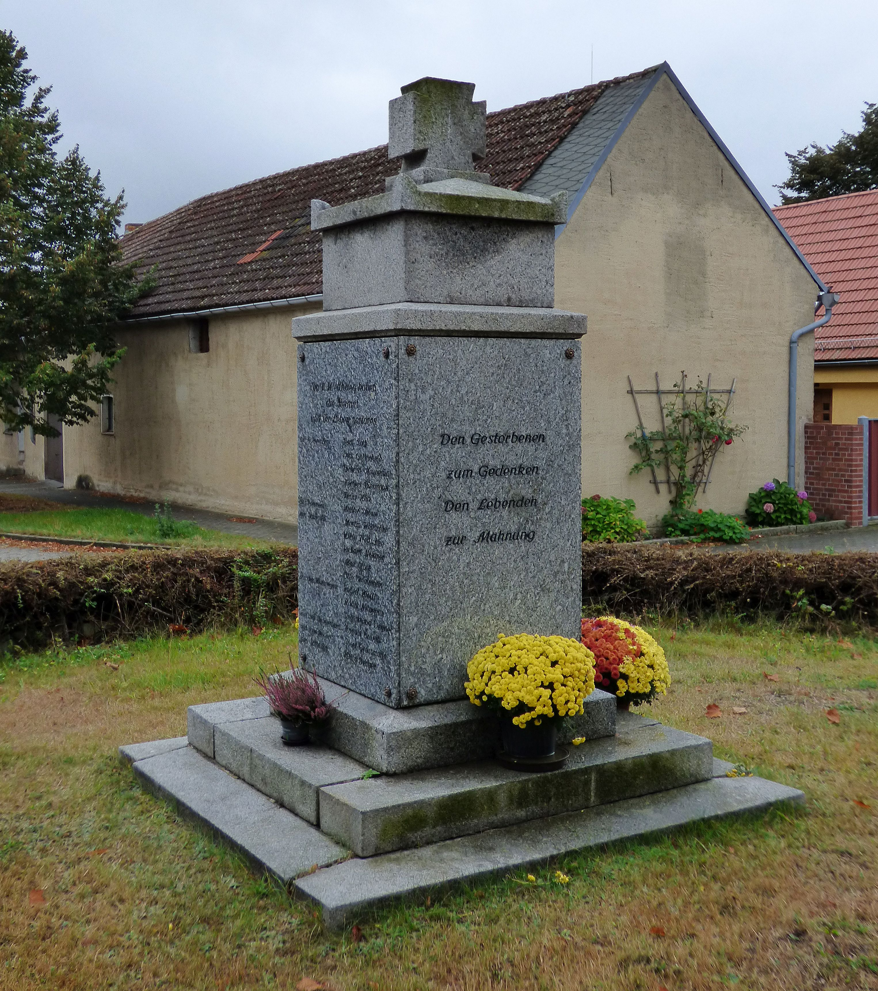 Gefallenendenkmal in Kahla